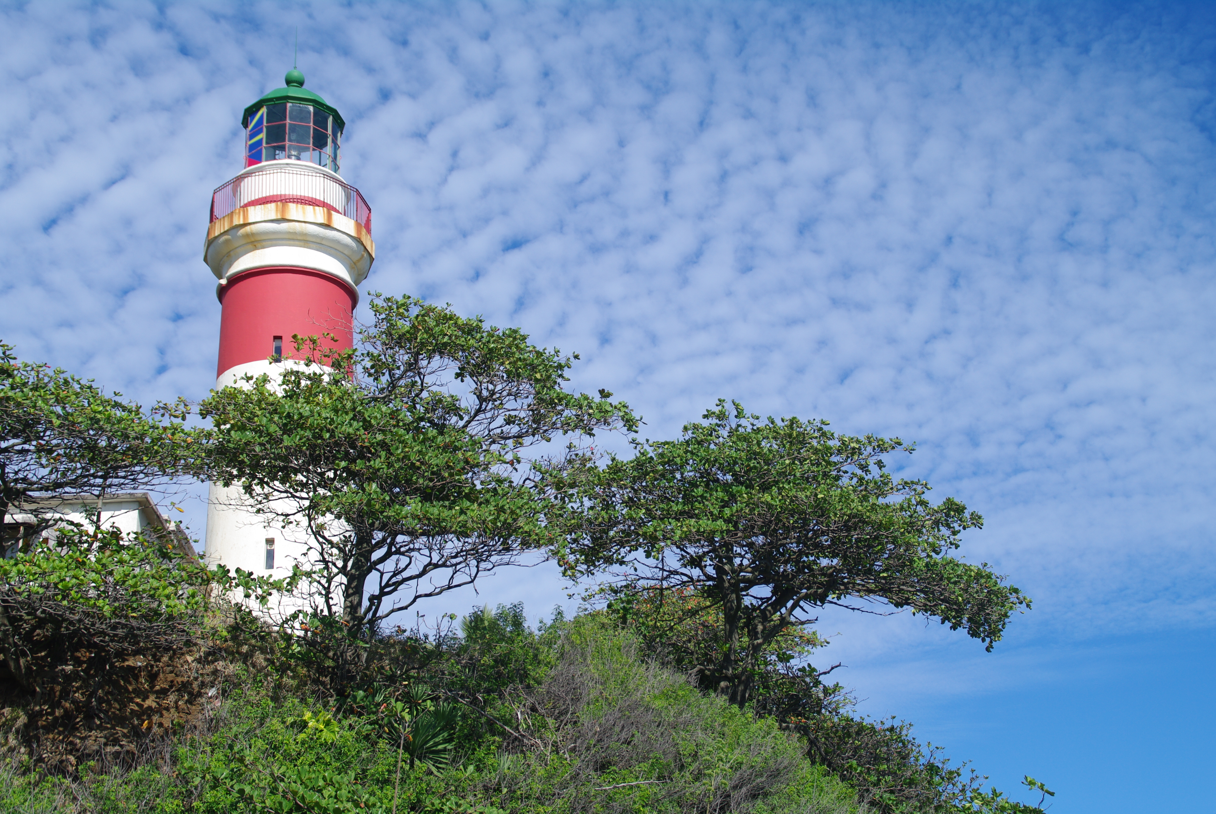 Phare de Bel-Air à Sainte-Suzanne (La Réunion), unique phare de la Réunion